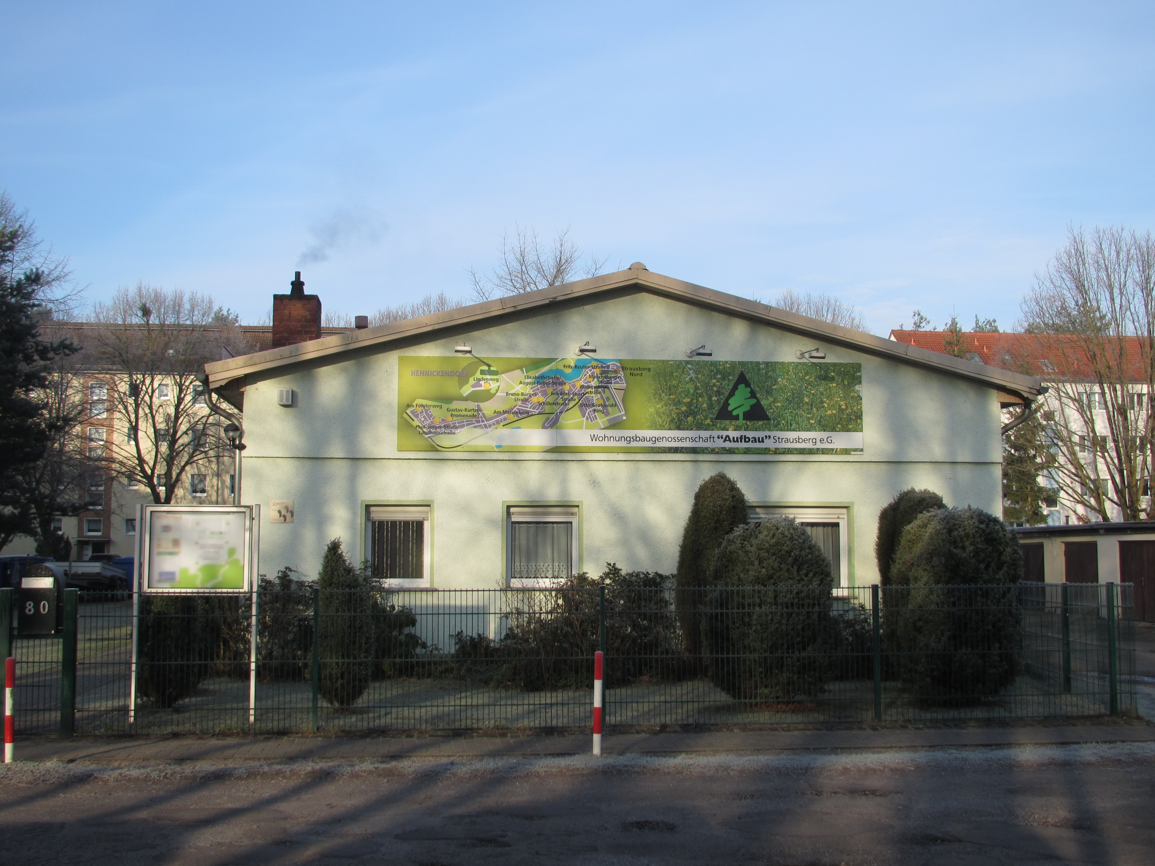 Strausberg Stadtansichten WBG Aufbau eG altes Verwaltungsgebäude - Gustav-Kurtze-Promenade 80